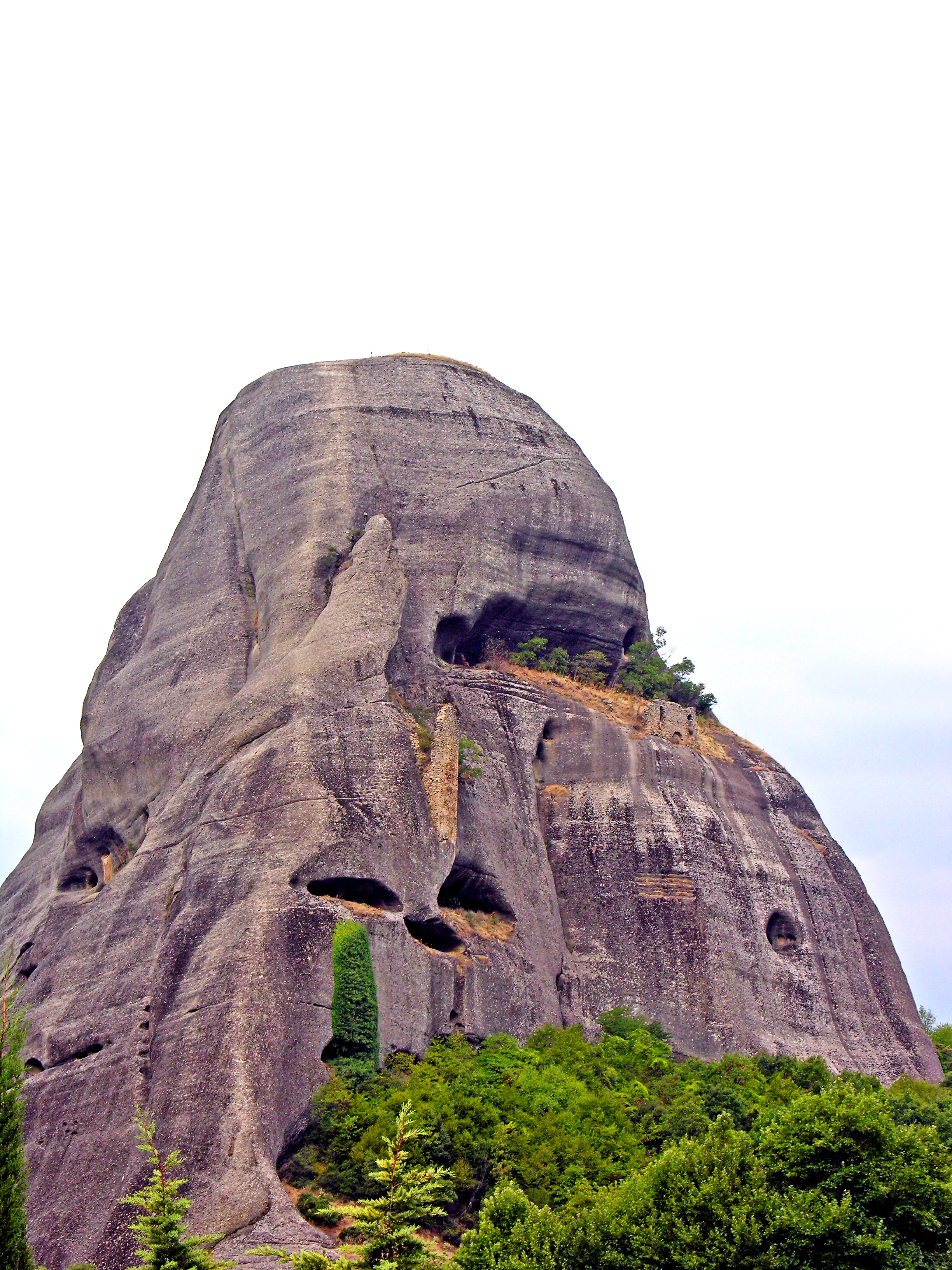 Metéora, Dúpianiturm mit Pandókrator-Ruinen